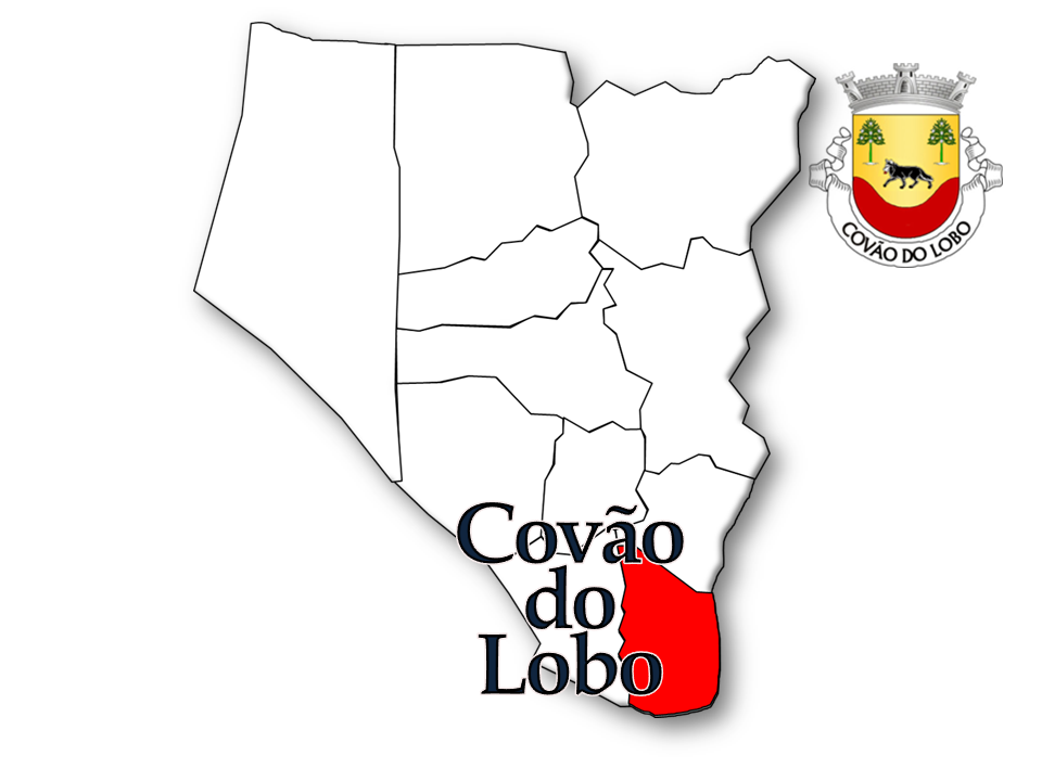 Evolução da População